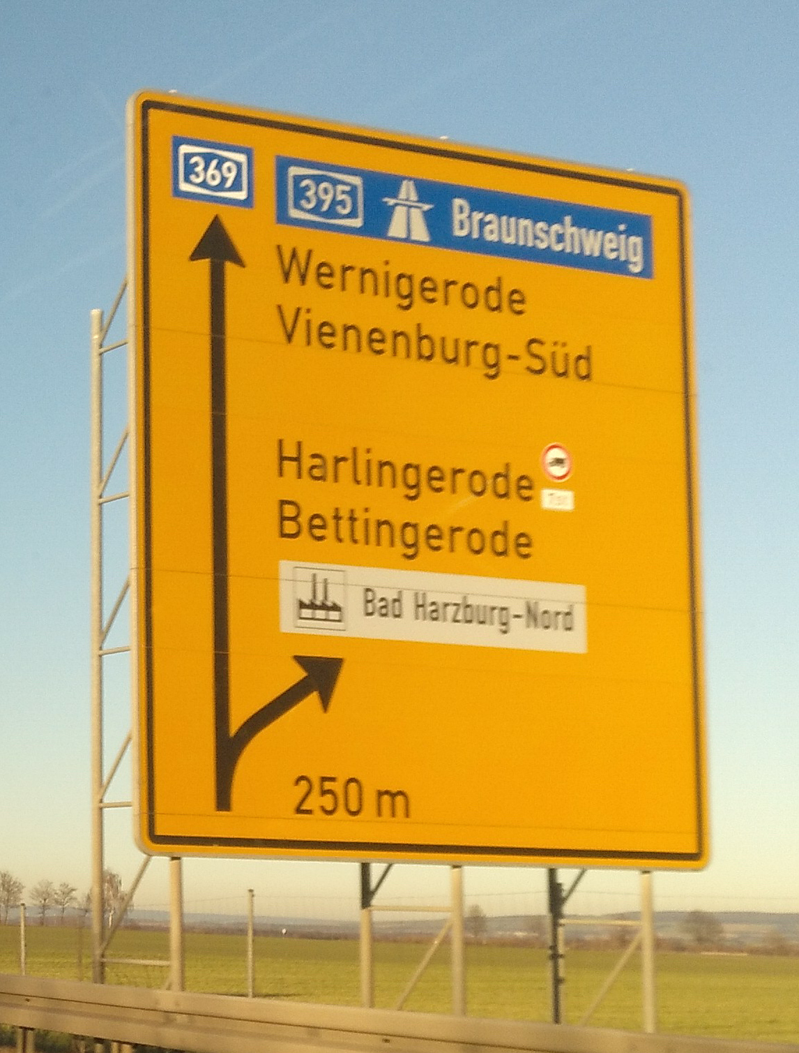 Beschilderung der BAB 369 bei Harlingerode, hier noch auf Basis der ehemaligen B6-Schilder mit gelber Farbe und überklebter Nummer.